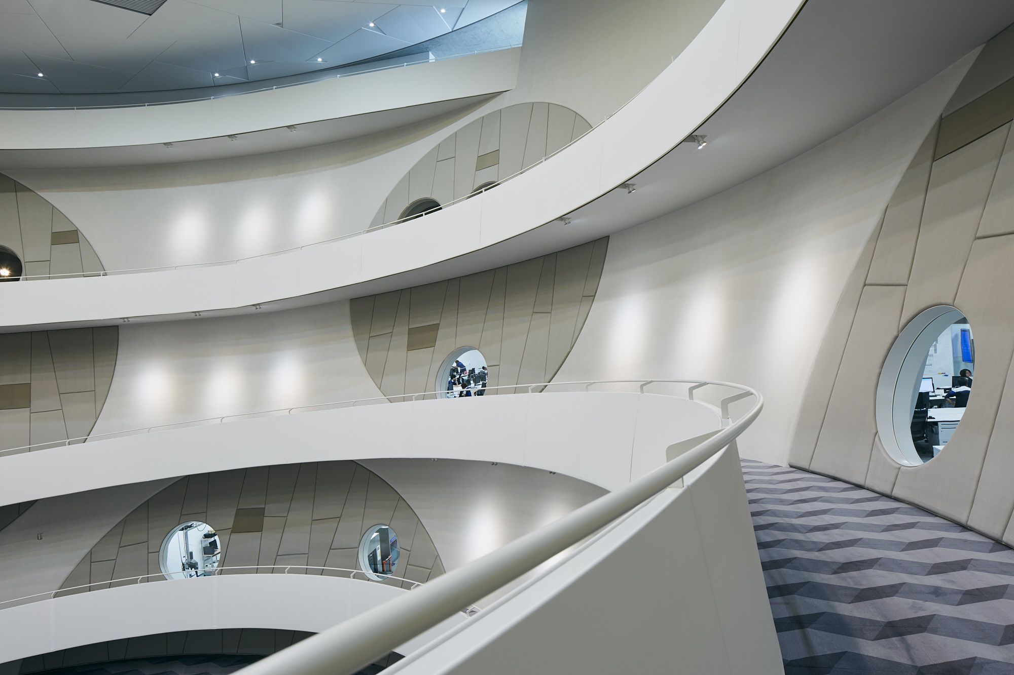 ナカニシ新本社Ｒ＆ＤセンターＲＤ１内の写真。螺旋スロープによって１～４階まで繋がるセンターコート。スロープに沿って15カ所に穿たれた直径１．７ｍの丸窓を通して、ＲＤ１のさまざまなシーンが展開される。